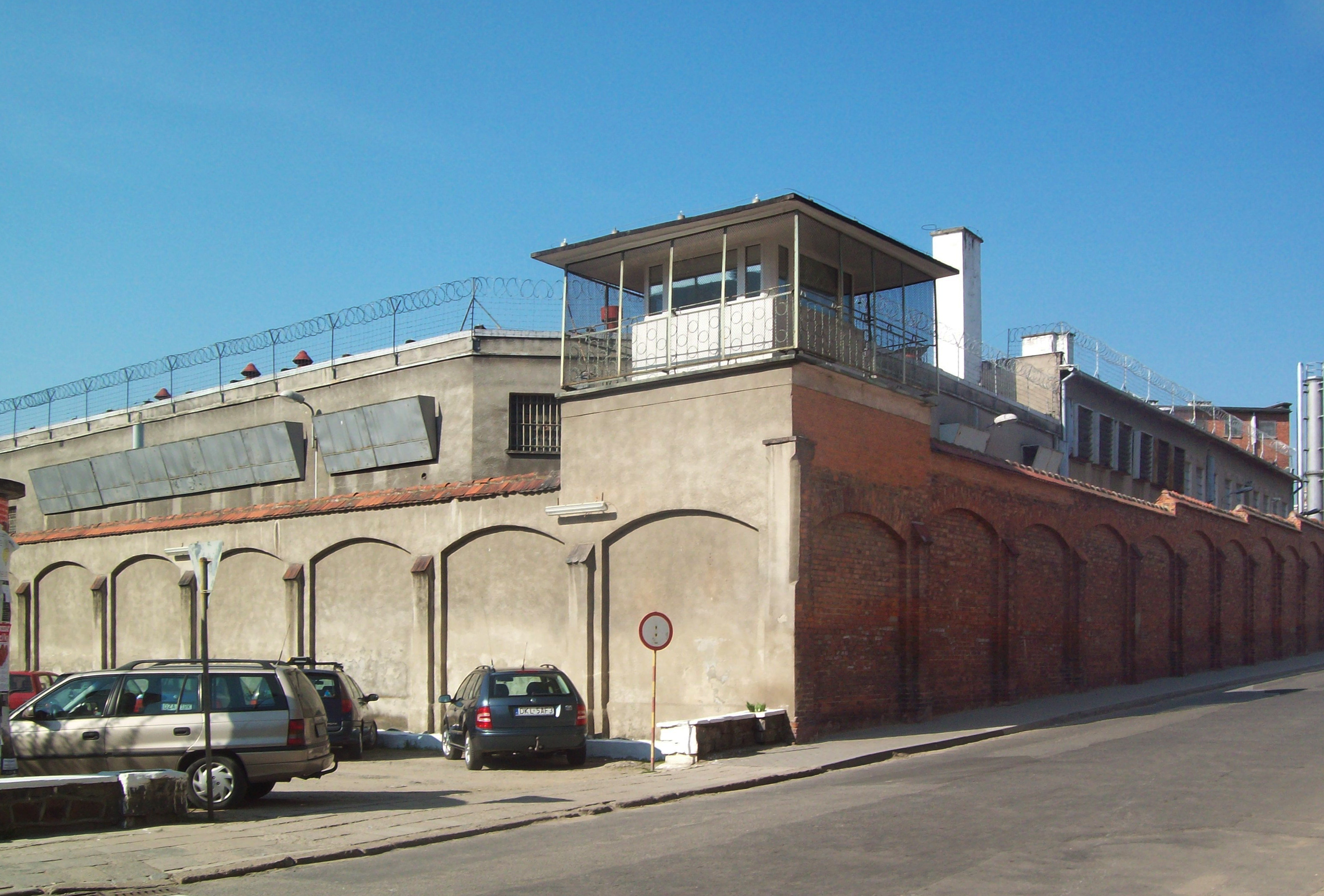 Więzienie w Kłodzku